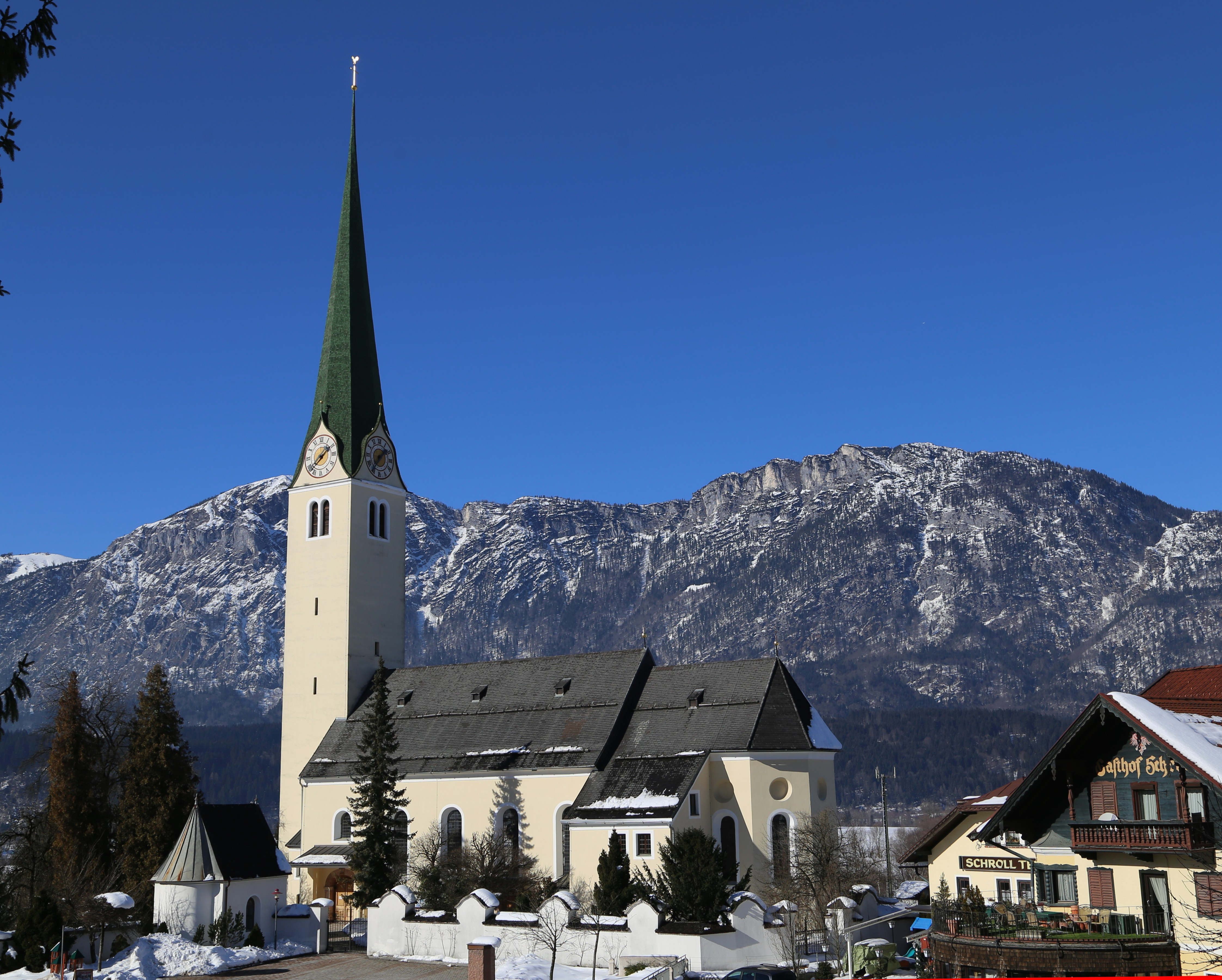 Kath. Pfarrkirche Mariä Himmelfahrt (lt. BDA Unsere Liebe Frau), Kirchbichl